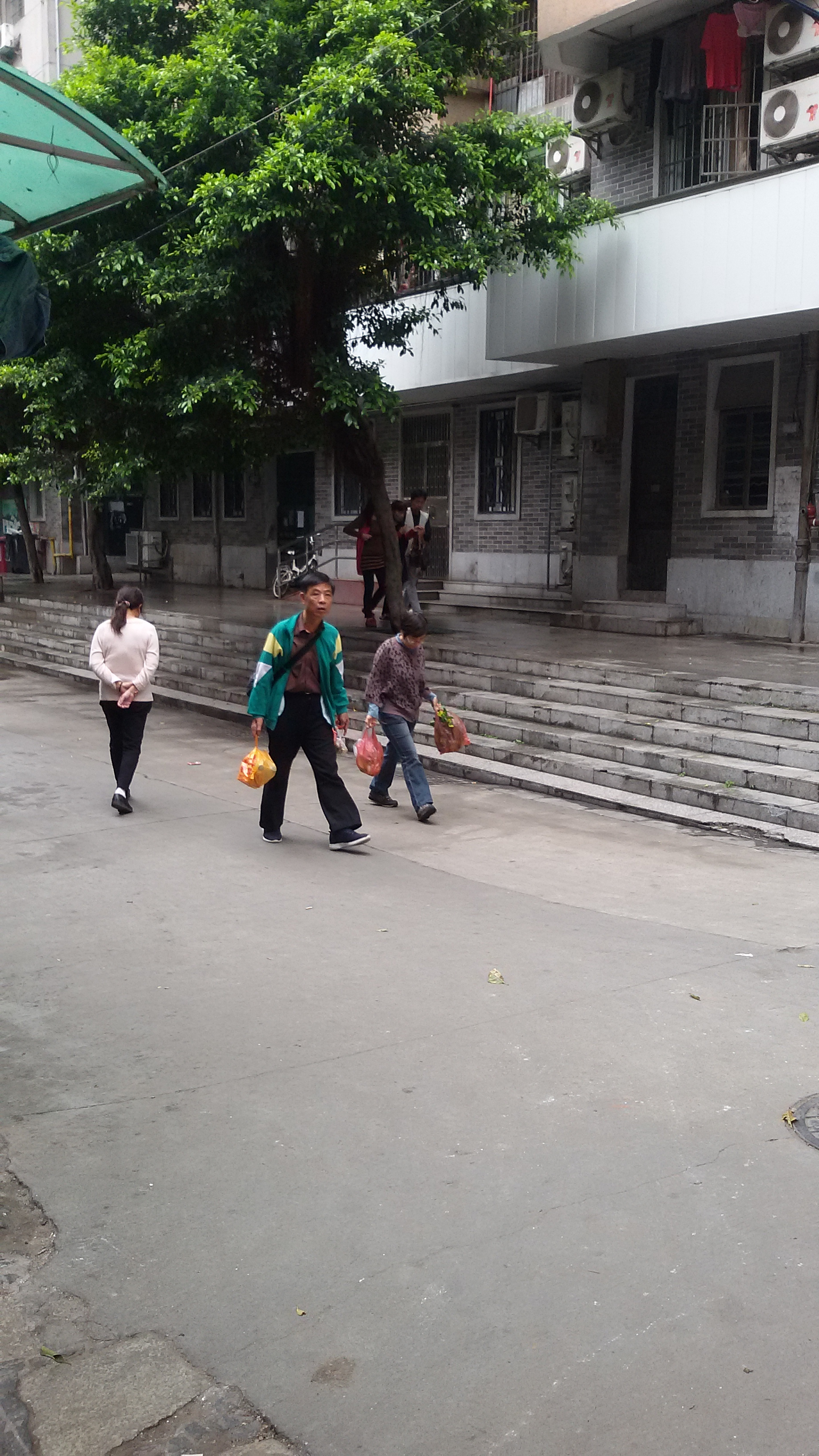 粵語: 舊時廣州市第32中學用過嘅校服